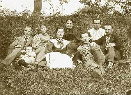 Heinrich Reifferscheid (rechts vorne in Kniebundhose) mit Verwandten und Freunden